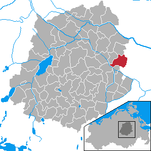 Bartow, Landkreis Demmin, Mecklenburg-Vorpommern